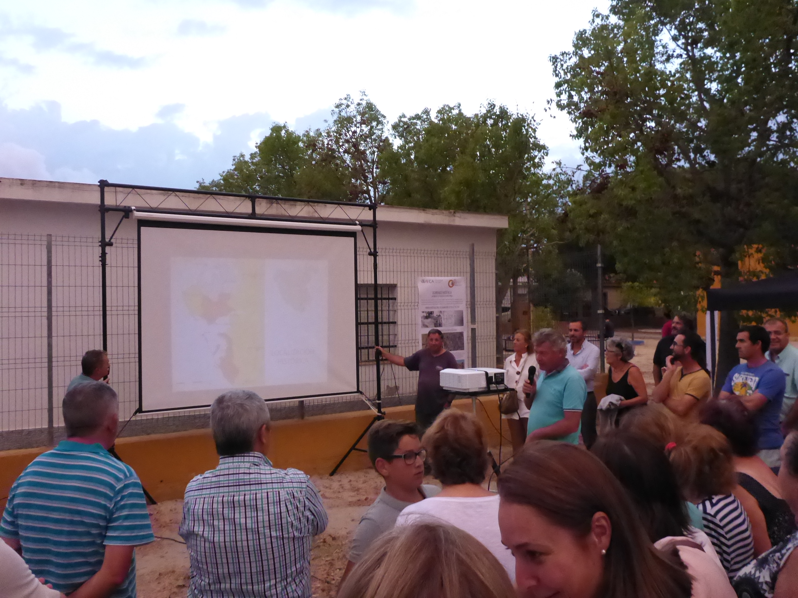 Mesas de Asta, Jerez de la Frontera (España). Presentación de resultados del proyecto de arqueológico desarrollador por la Universidad de Cádiz en el yacimiento de Asta Regia.